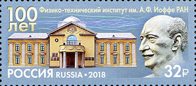 100 лет Физико-техническому институту им. А. Ф. Иоффе.